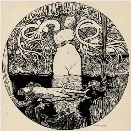 Bernhard Pankok: "Jugend" 24. Oktober 1896